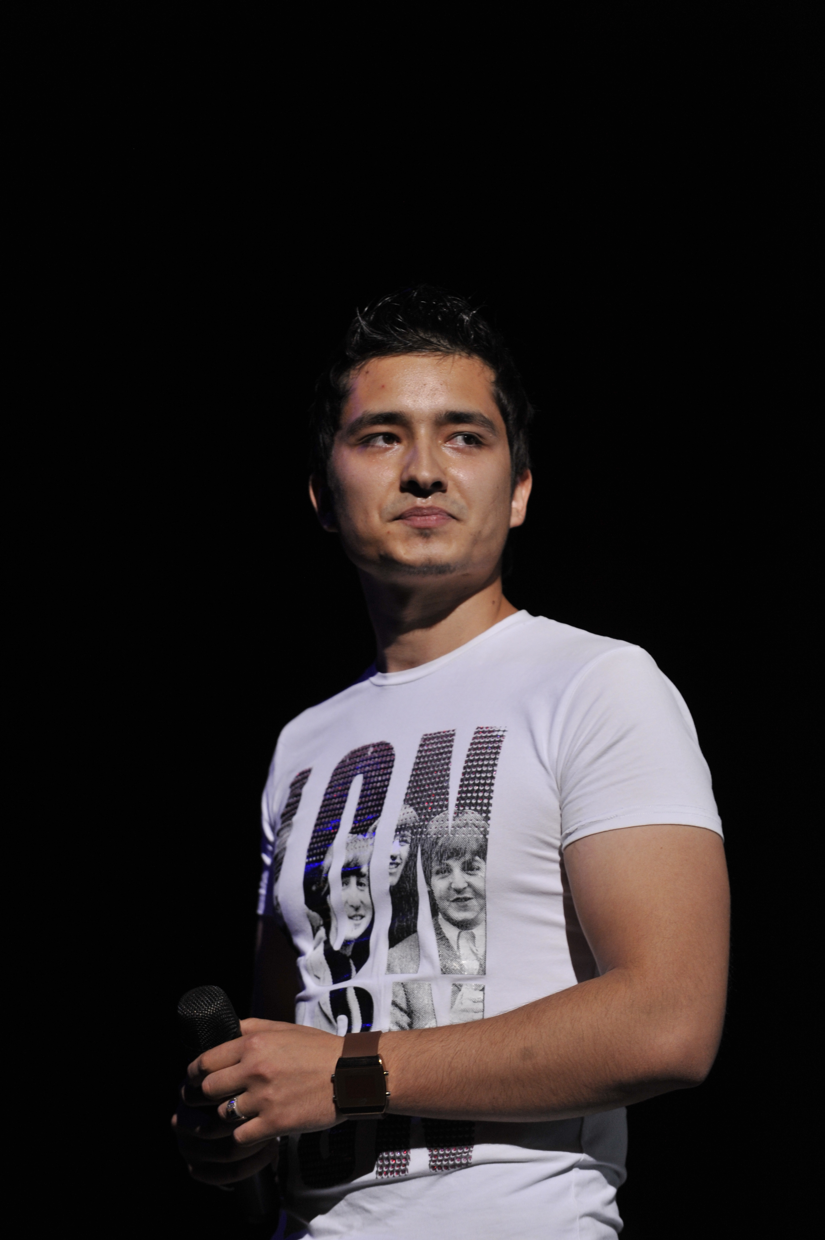 Далер Хонзода во время концерта